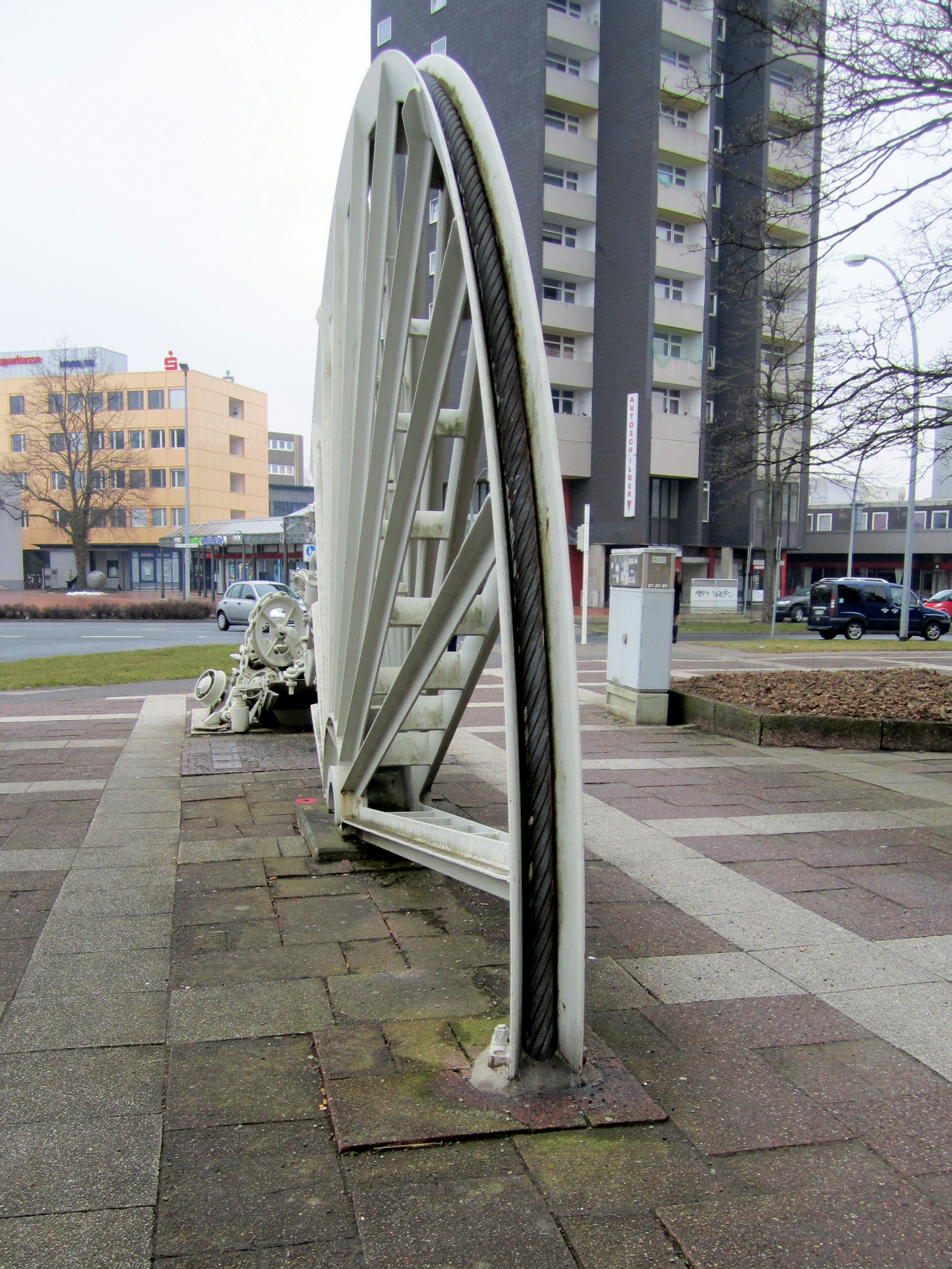 Stahlskuluptur aus verschiedenen Hinterlassenschaften des Salzgitter-Erzbergbaus.